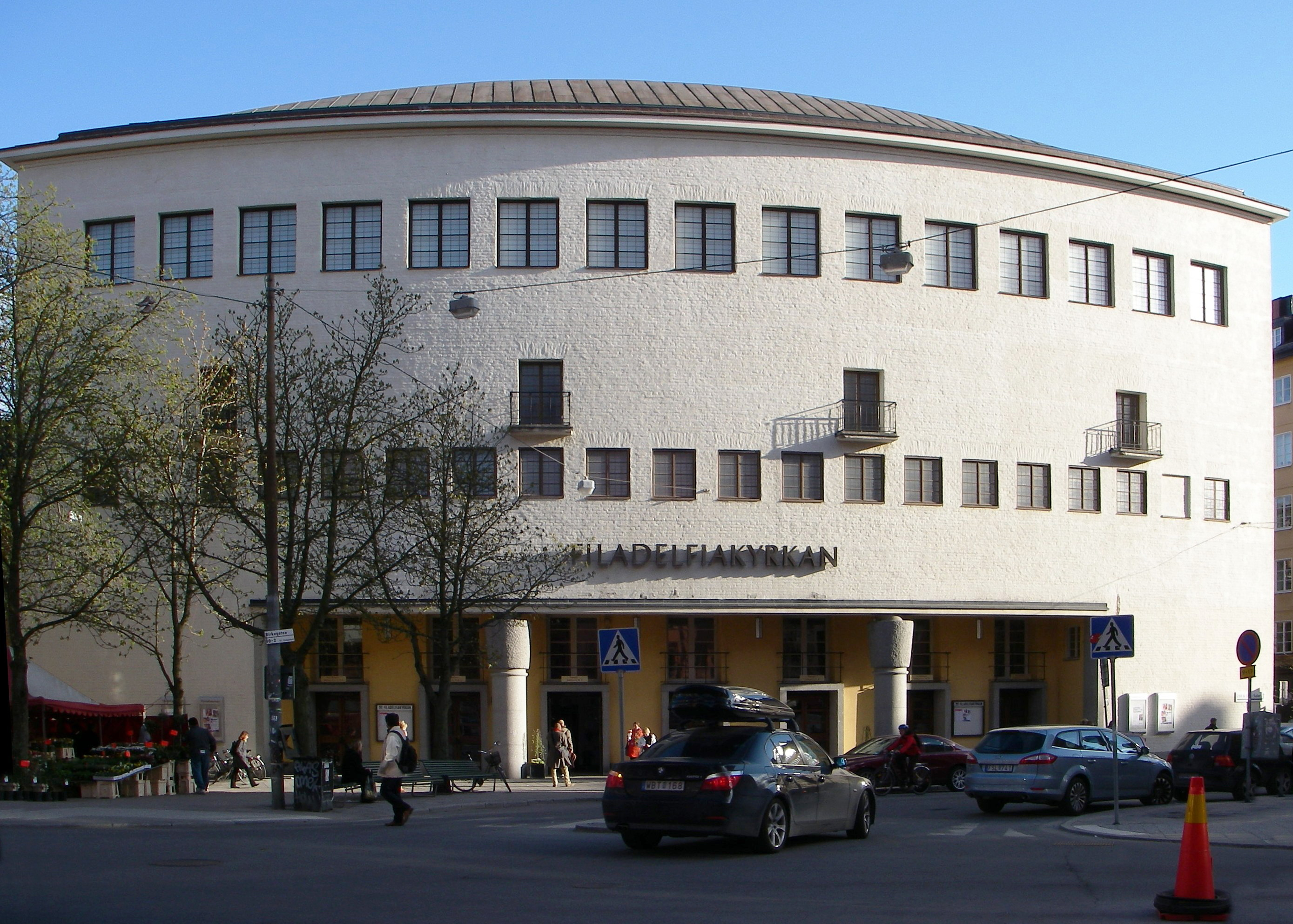 Filadelfiakyrkan på Rörstrandsgatan i Stockholm